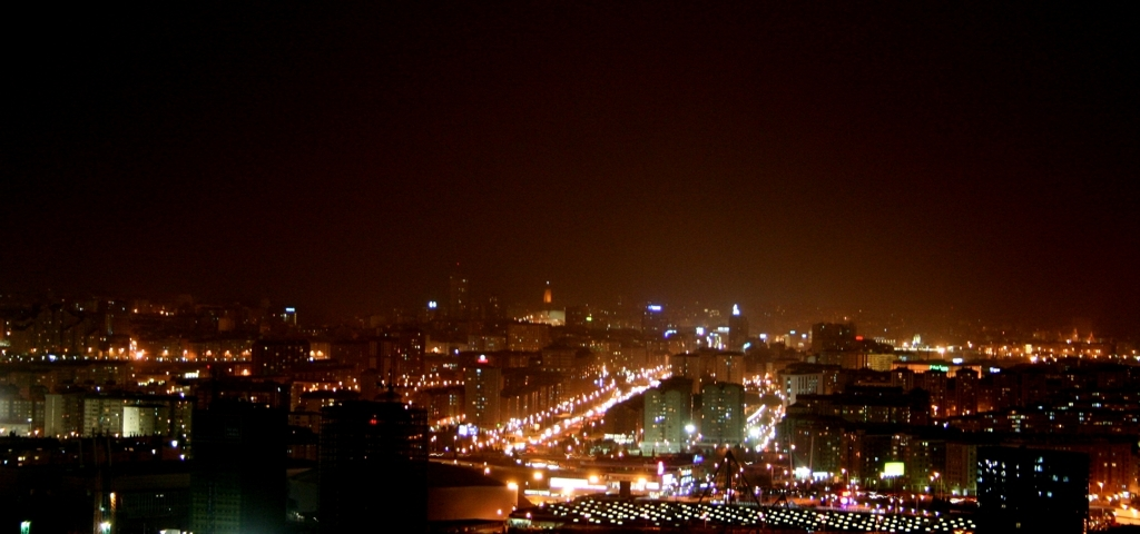 Vista de la ciudad de La Coruña desde la cuarta planta de la Escuela Técnica Superior de Arquitectura